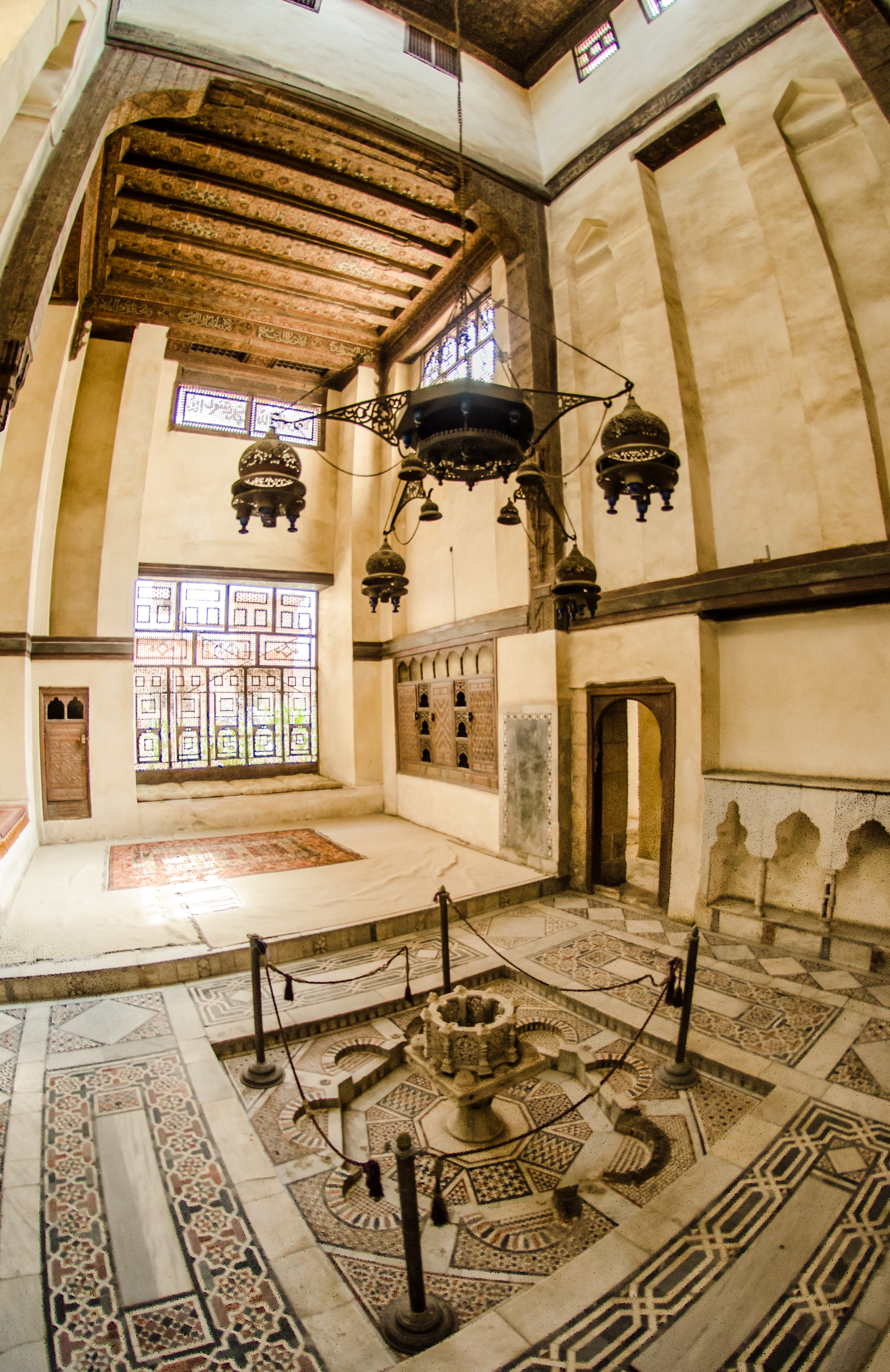 المعالم الاثرية من بيت السيحيمي 5